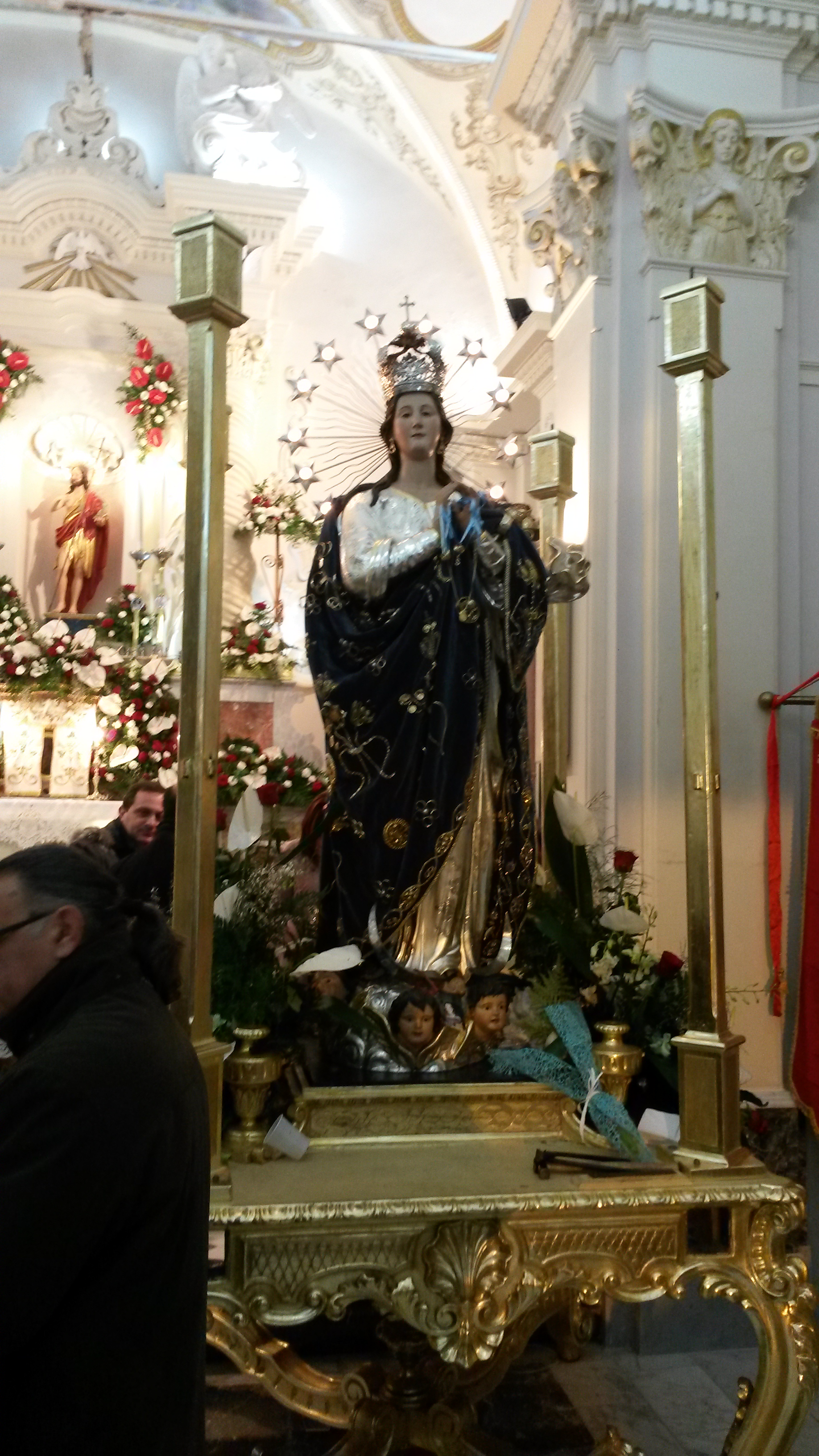 La statua dell'Immacolata,festa dell'Immacolata 2015, rientro della processione.